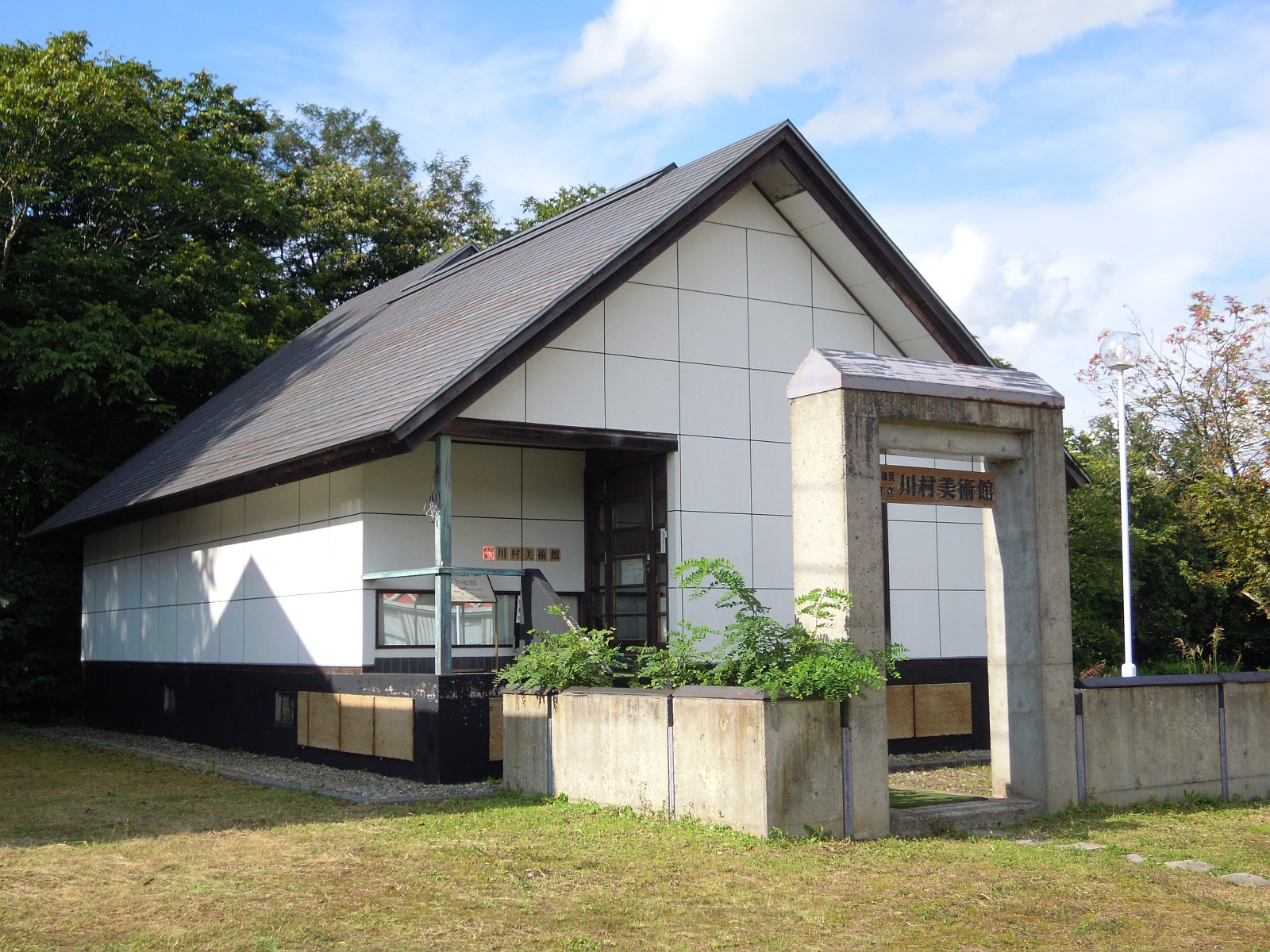 岩手県和賀郡西和賀町にある町立川村美術館